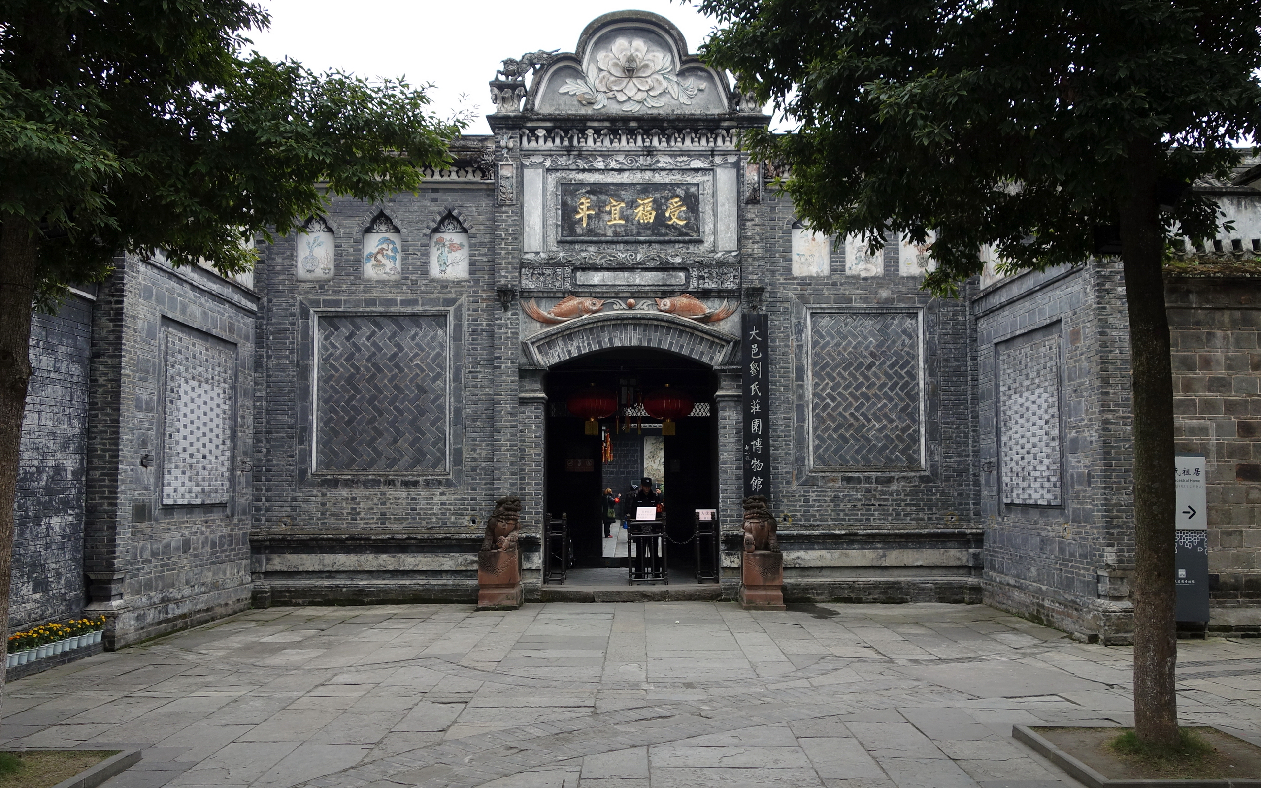 大邑刘氏庄园博物馆